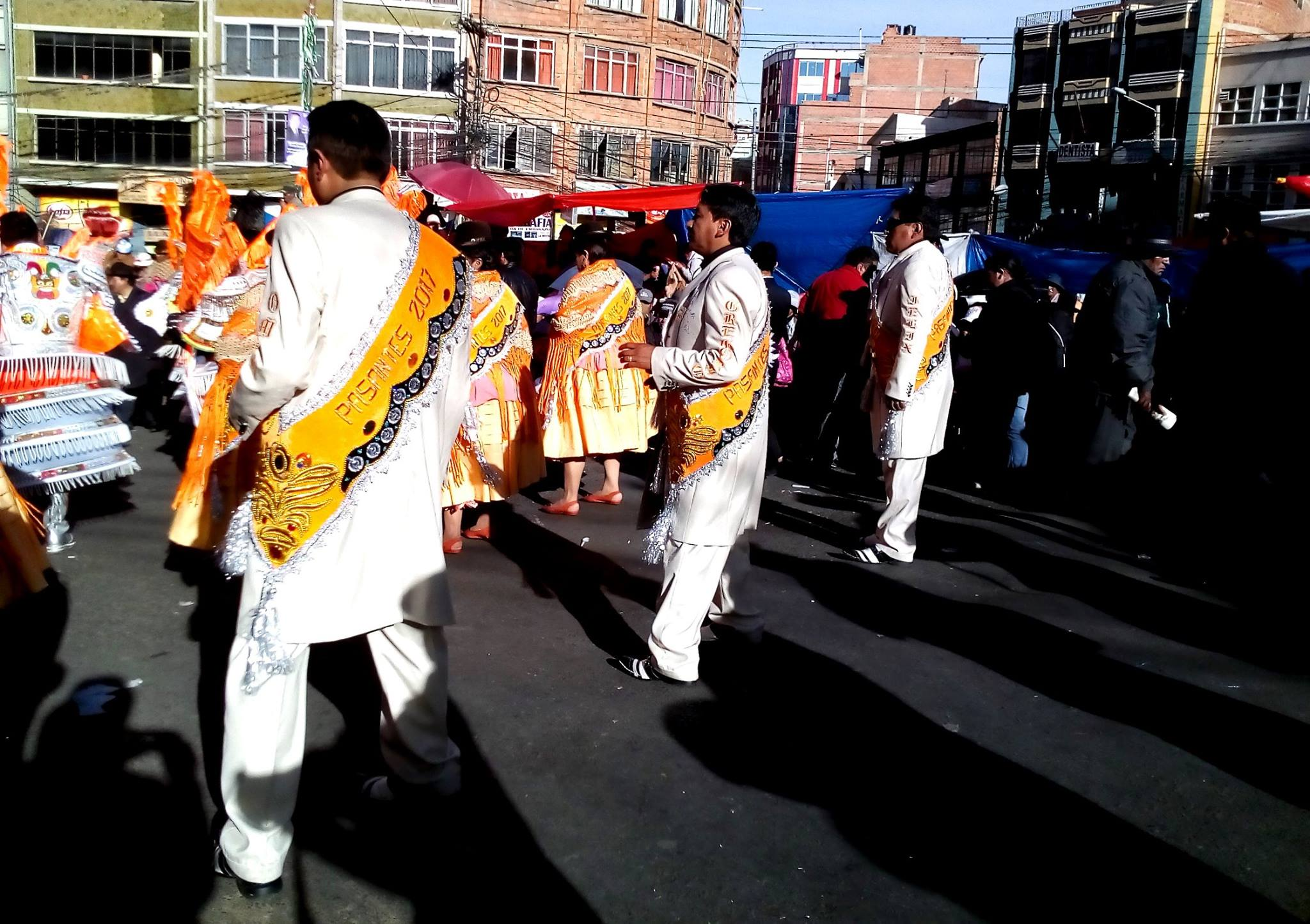 La Paz Bolivia 2017